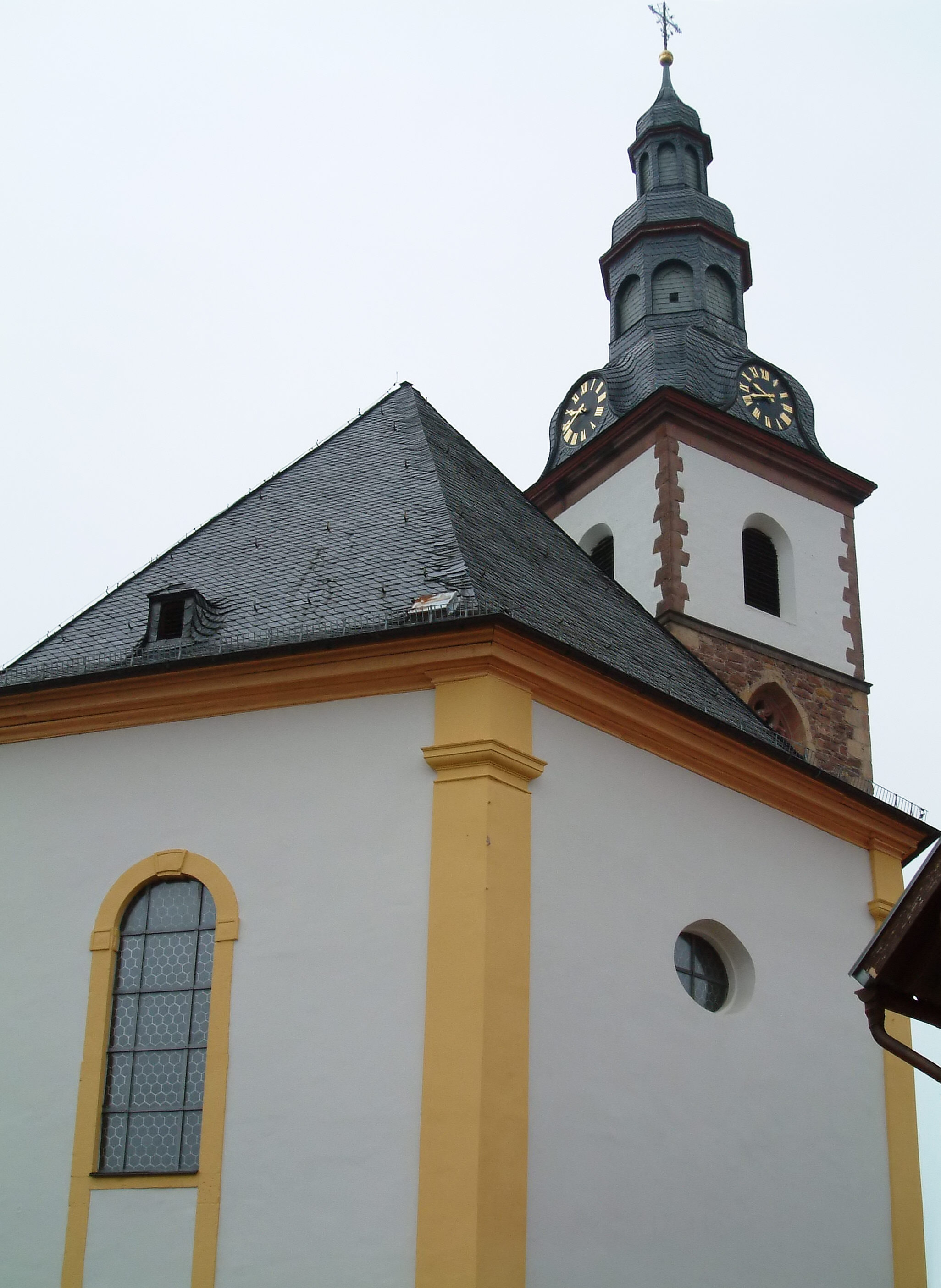 Bearbeitete Version von Bild:2006 Dirmstein-Laurentiuskirche-Südost.jpg durch Benutzer:Smial Original-Beschreibung: (Uploaded by Benutzer:Mundartpoet) Laurentiuskirche (Dirmstein) (von Südost) zu Dirmstein, selbst fotografiert am 2006-04-27 und freigegeben durch Benutzer:Mundartpoet Uploaded with Reworkhelper